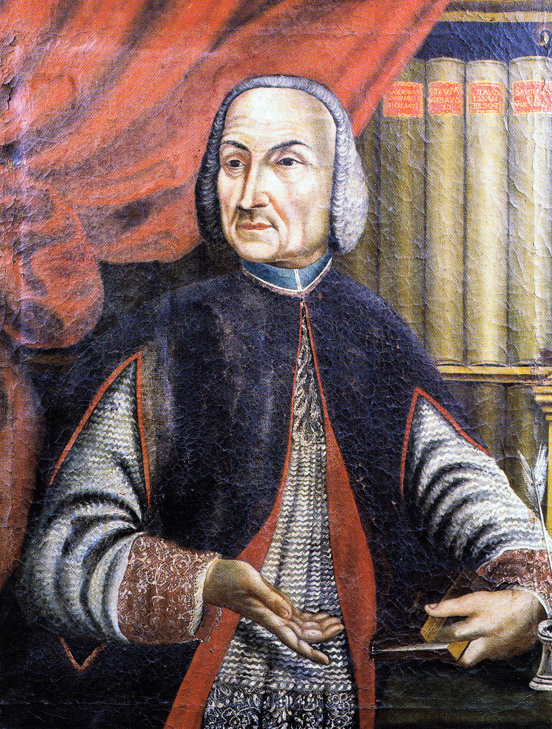 Mario Guarnacci, 18. Jahrhundert. Source Stephan Steingräber und Horst Blanck: Volterra. Zabern, Mainz 2002, S. 38